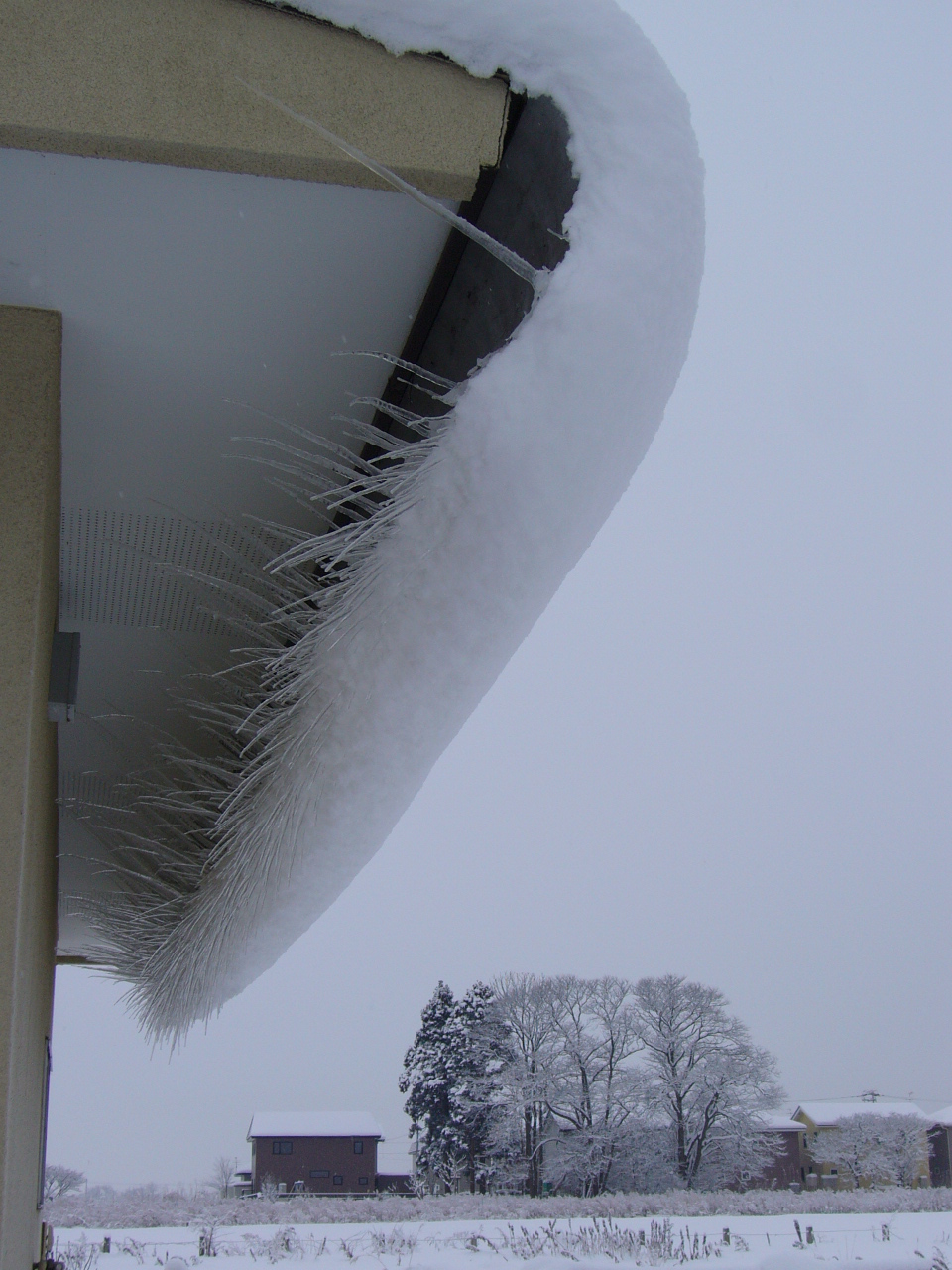 屋根上からの雪に押され、横向きに伸びたja:氷柱 北海道渡島郡大野町（現・北斗市） 大野駅前郵便局にて